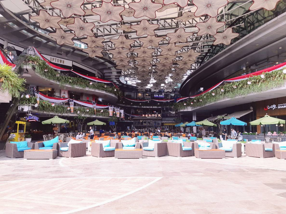 Avenue of the Stars, Lippo Mall Kemang